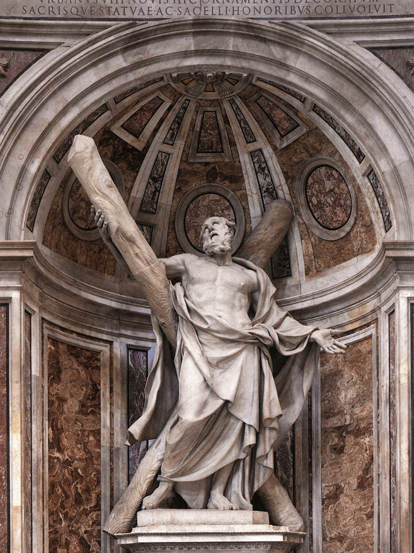 San Andrés, Vaticano